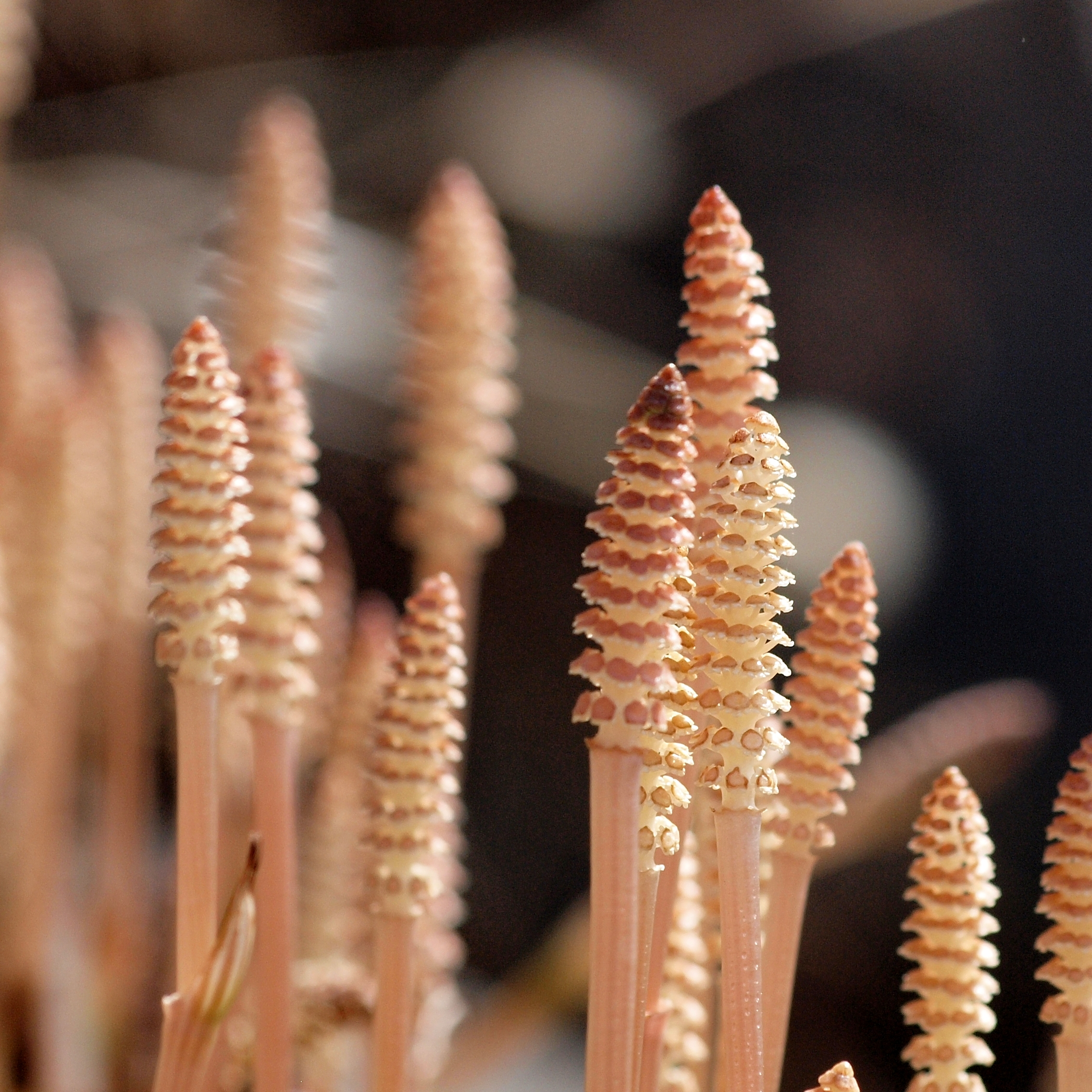 ED70-300mm + E620